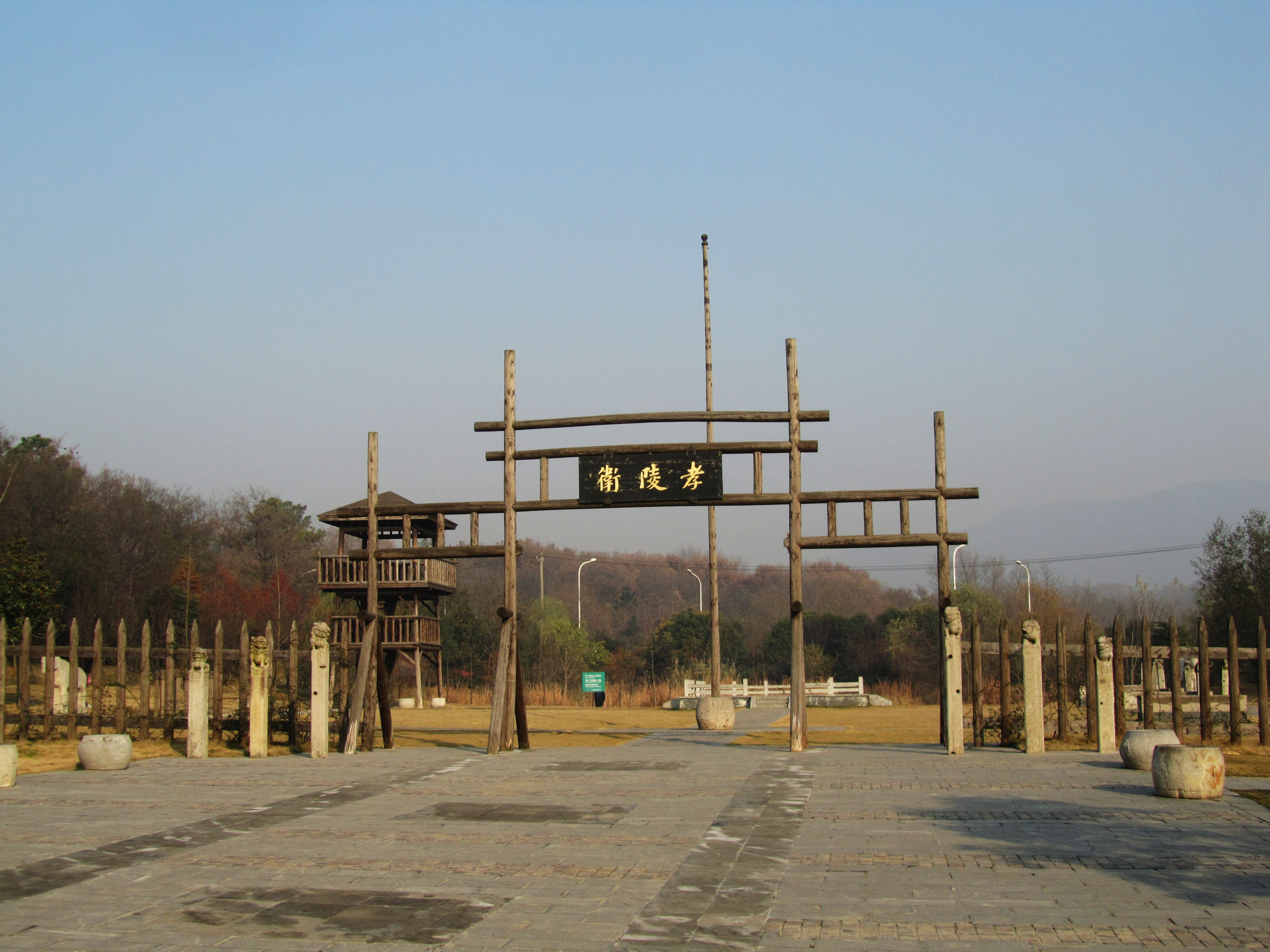 南京下马坊公园内复原的孝陵卫大营。